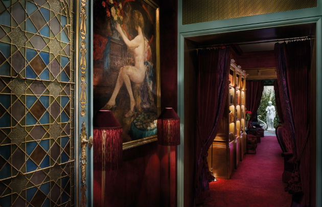 Maison souquet